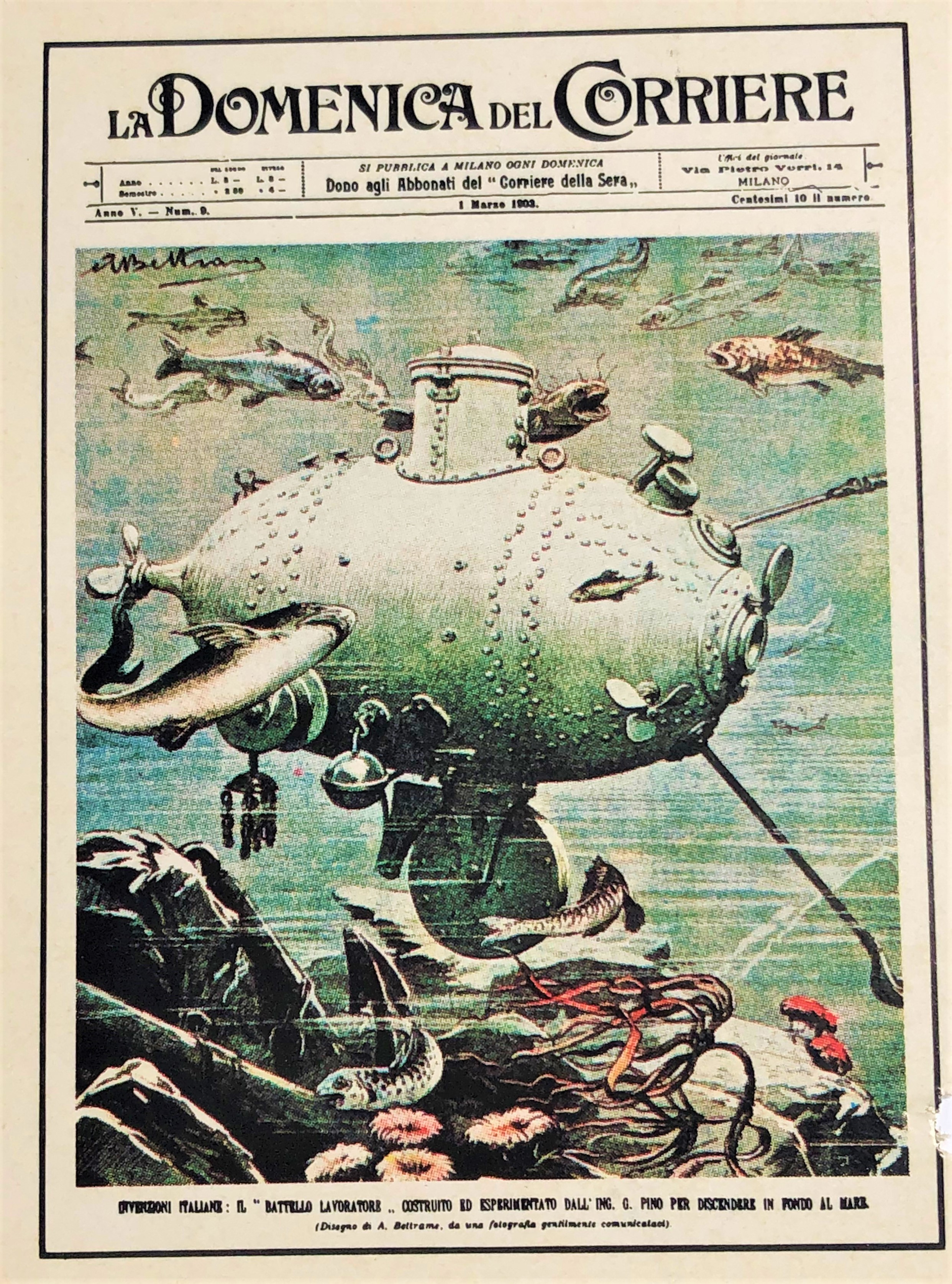 Copertina di La Domenica Del Corriere del 1 Marzo 1903